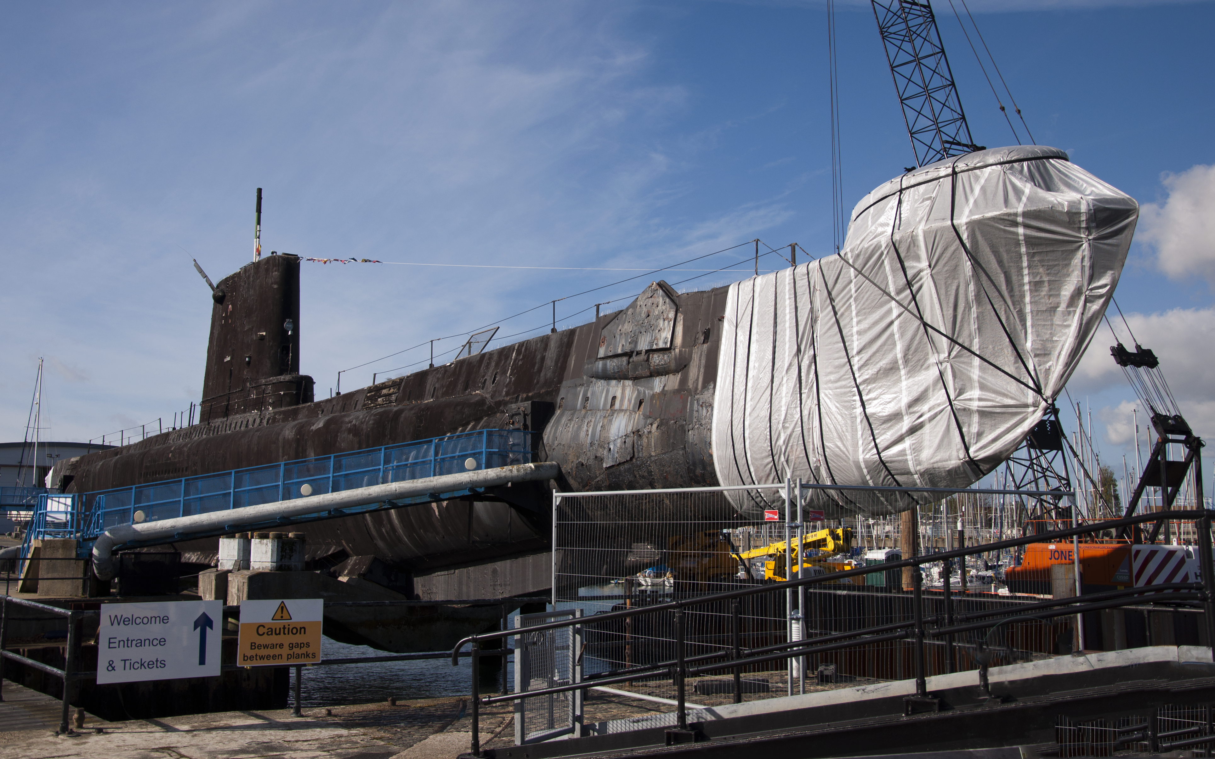 HMS Alliance in het Royal Navy Submarine Museum te Gosport, Engeland